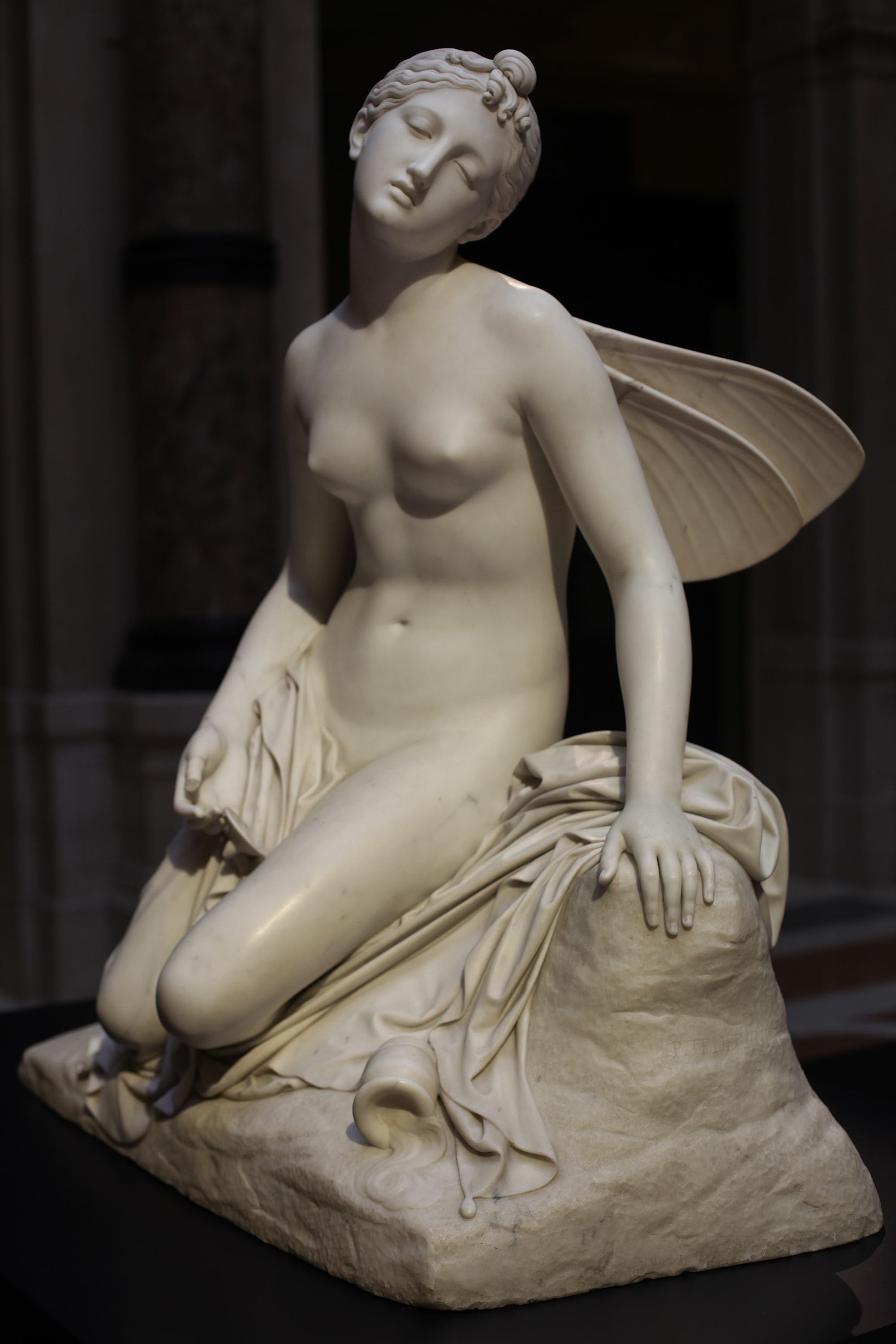 Pietro Tenerani (1789-1869) Psiche svenuta lato sinistro (pre 1838). Cusotdita all'Ermitage di San Pietroburo; fotografata alla mostra "Romanticismo", Gallerie d'Italia Milano 2018